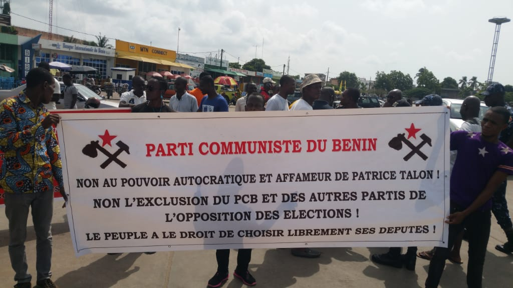 Devant la Cena le jour de la clôture de dépôt des dossiers, le 3 mars 2019. (VOA/Ginette Fleure Adandé)